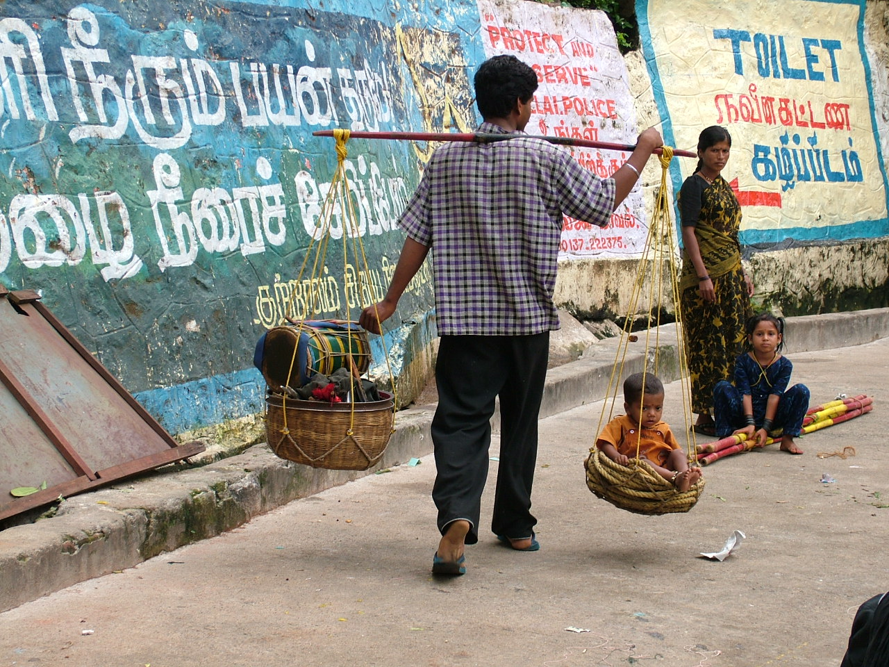 The street is the home of somebody. This is like that one